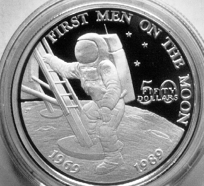 Sammlermünze anlässlich der 1.bemannten Mondlandung